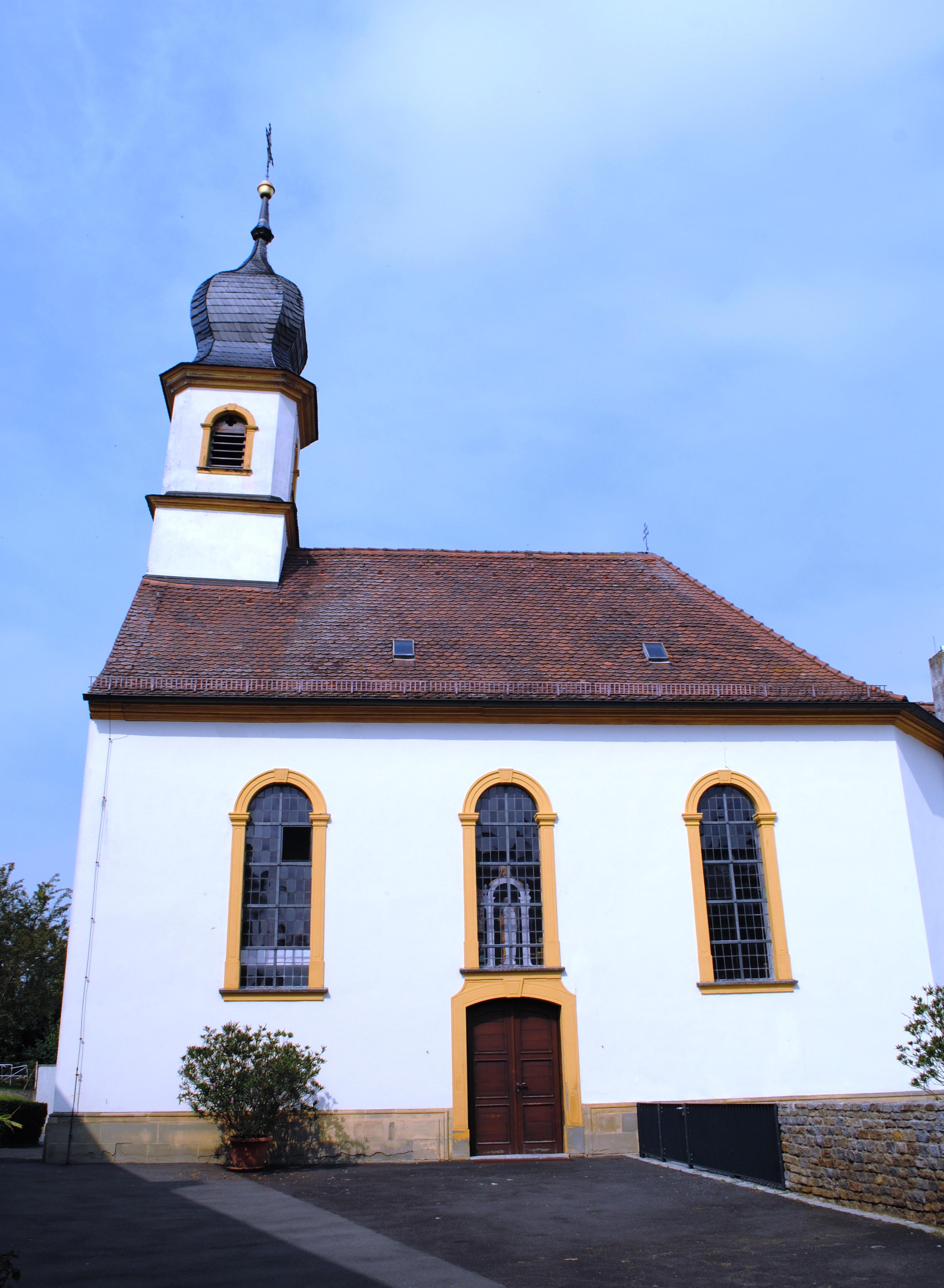 Kirche St. Jakobus der Ältere, EffeldorfThis is a photograph of an architectural monument.